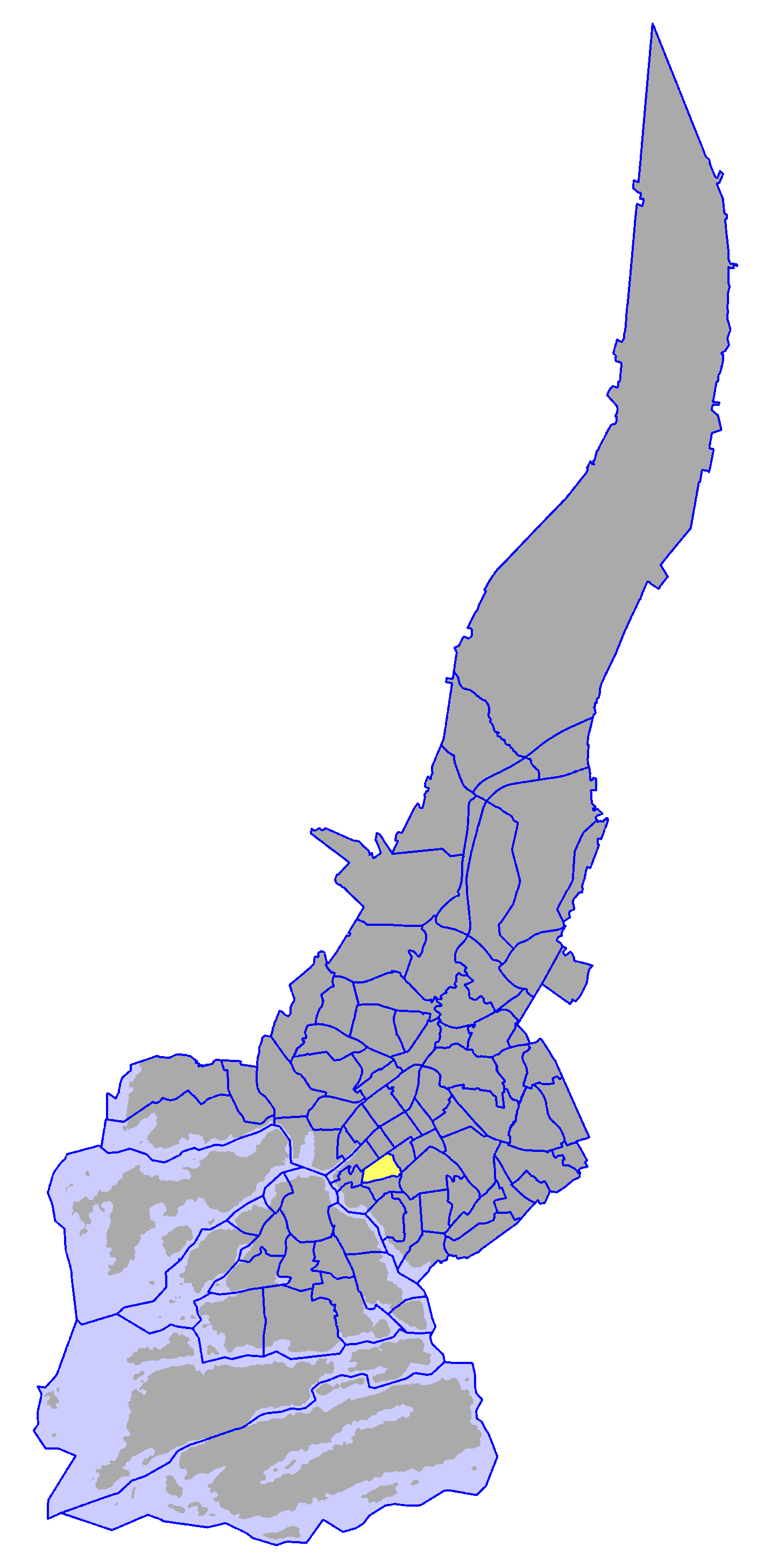 District of Vähäheikkilä, in Turku